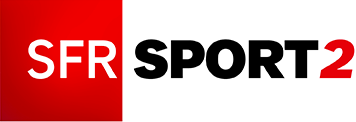 Logo de SFR Sport 2.